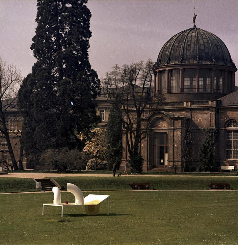 Bundesgartenschau 1967 Karlsruhe